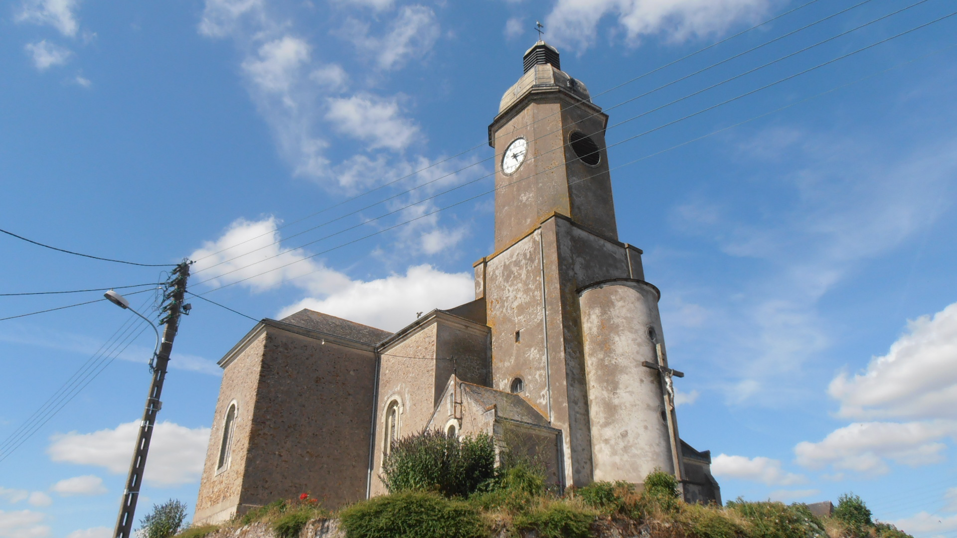 l'église